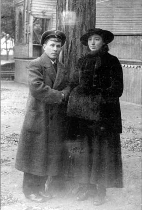 Наум Резников с женой Беллой, Екатеринослав